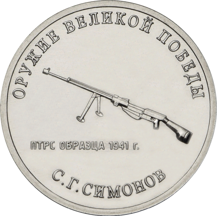 Монета Банка России. 25 рублей, реверс, анциркулейтед. Медно-никелевый сплав. Серия «Оружие Великой Победы (конструкторы оружия)». Конструктор оружия С.Г. Симонов, противотанковое ружьё Симонова. Рельефное изображение противотанкового ружья Симонова, под ним – надпись «ПТРС ОБРАЗЦА 1941 г.»; вдоль канта – надписи, вверху: «ОРУЖИЕ ВЕЛИКОЙ ПОБЕДЫ», внизу: «С.Г. СИМОНОВ». Художник: Е.В. Крамская. Скульптор: компьютерное моделирование. Московский монетный двор.